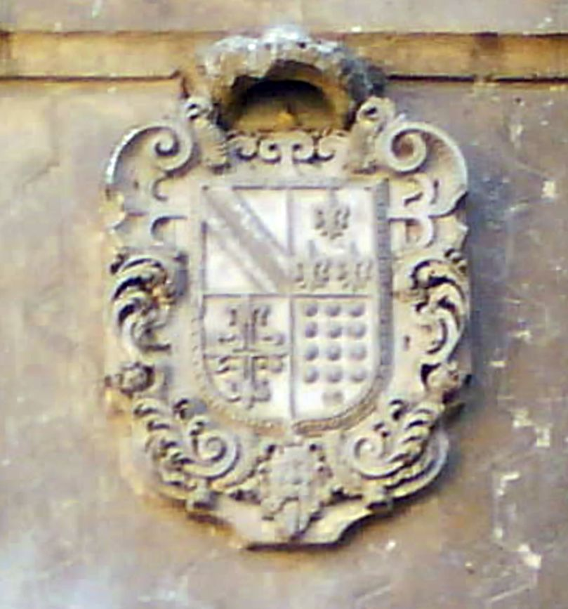 Escudo de Mateo Pablo diaz de Lavandero, I marqués de Torrenueva, en su palacio de Sevilla. Se pueden observar el escudo con los cuatro cuarteles del apellido Diaz de Lavandero, la corona de marqués y la cruz de caballero de la Orden de Santiago.